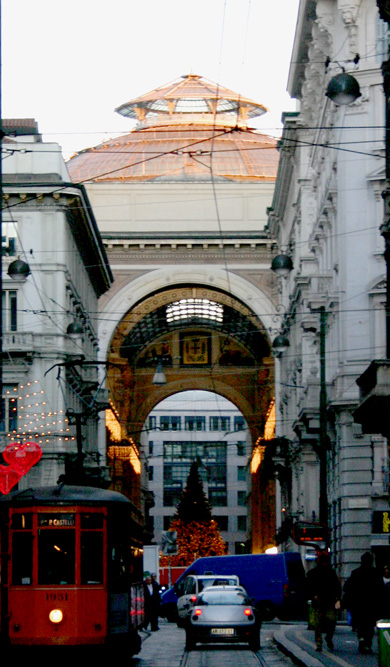 Cupola della Galleria Vittorio Emanuele